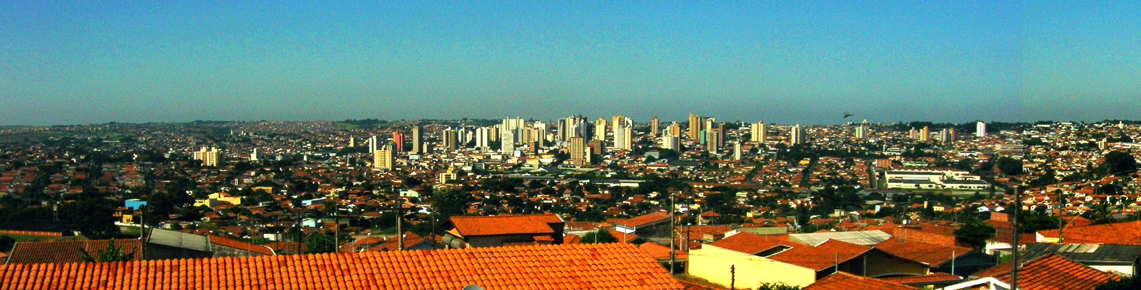 Vista parcial de Limeira a partir do Jardim Planalto